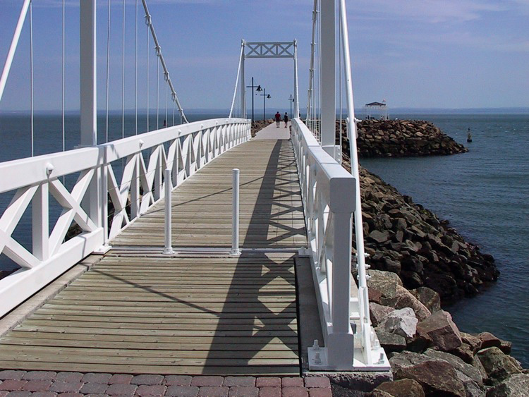 Passerelle de Pointe-au-Pic, Québec, Canada. Située au pied du Casino de Charlevoix, sur la rive du fleuve Saint-Laurent, la passerelle du quai de Pointe-au-Pic mène à une plate-forme couverte avec bancs publics permettant l'observation des oiseaux aquatiques. Pointe-au-Pic est en fait le berceau de la villégiature au Canada.